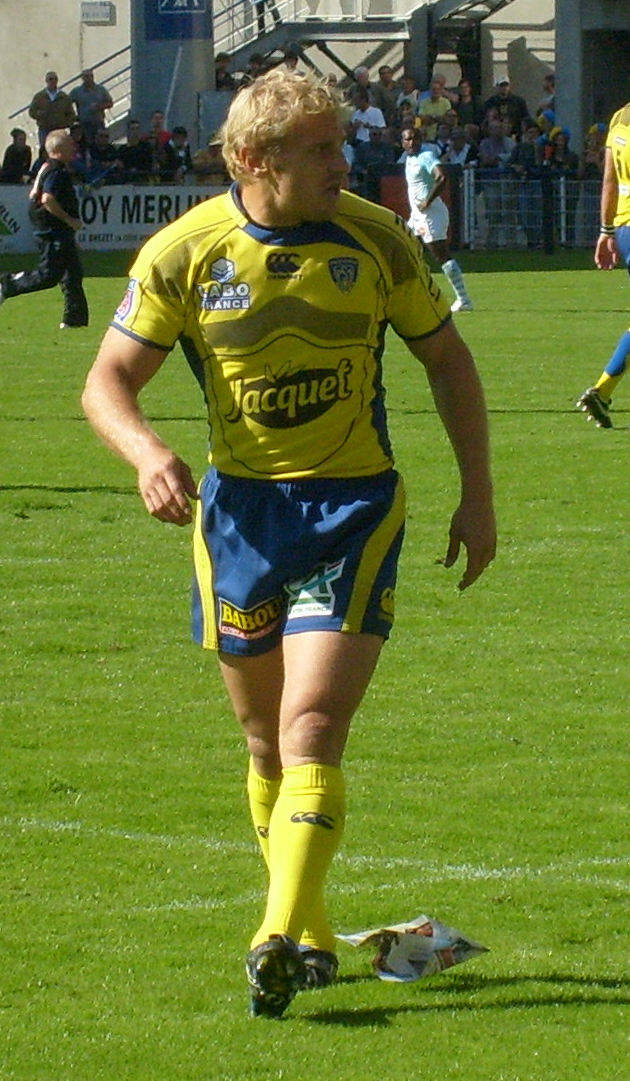 Le rugbyman sud-africain Brent Russell avec l'ASM Clermont Auvergne face à l'Aviron Bayonnais au Stade Marcel Michelin de Clermont-Ferrand.